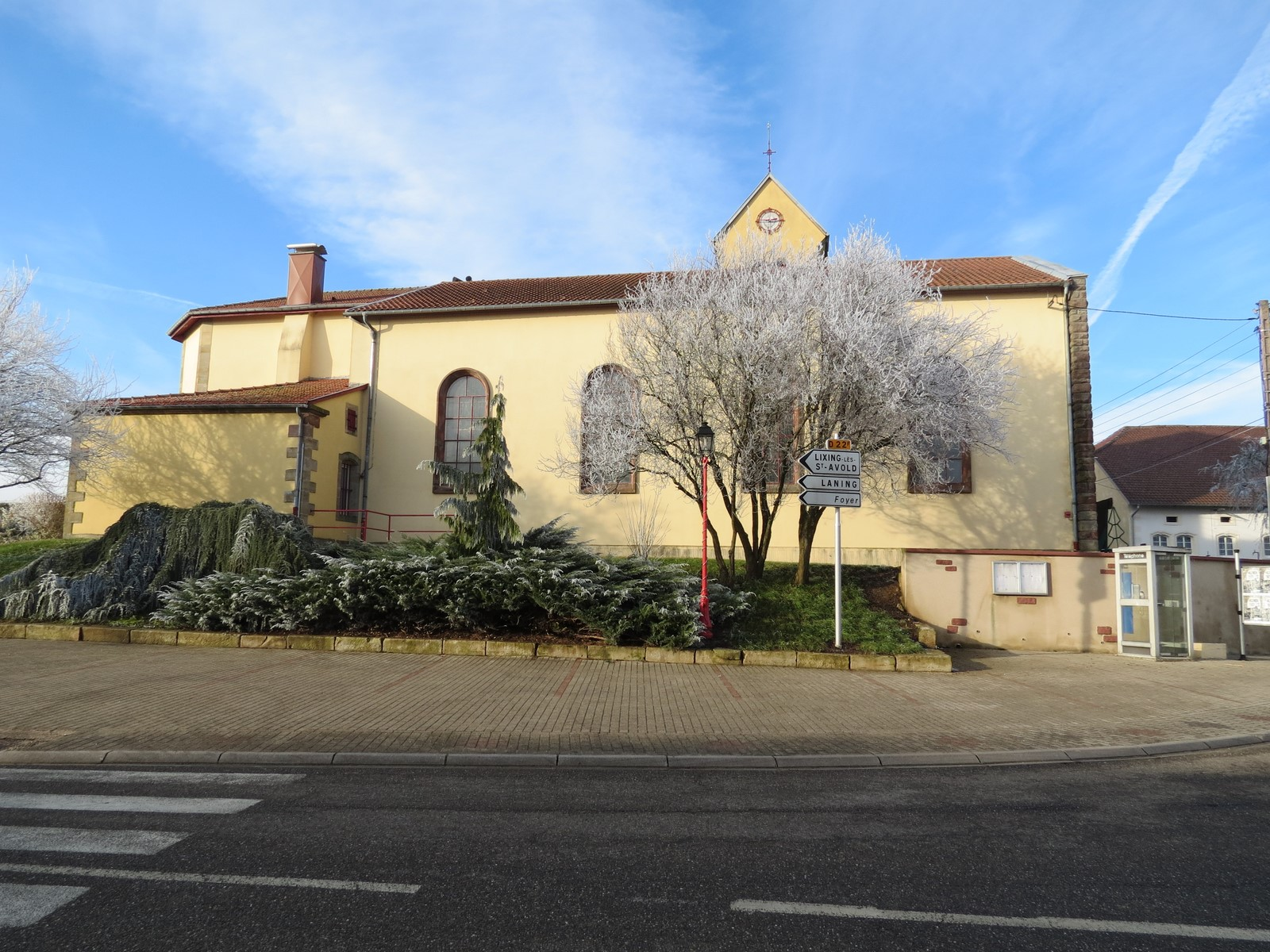 Église Saint-Jacques du village de MAXSATDT